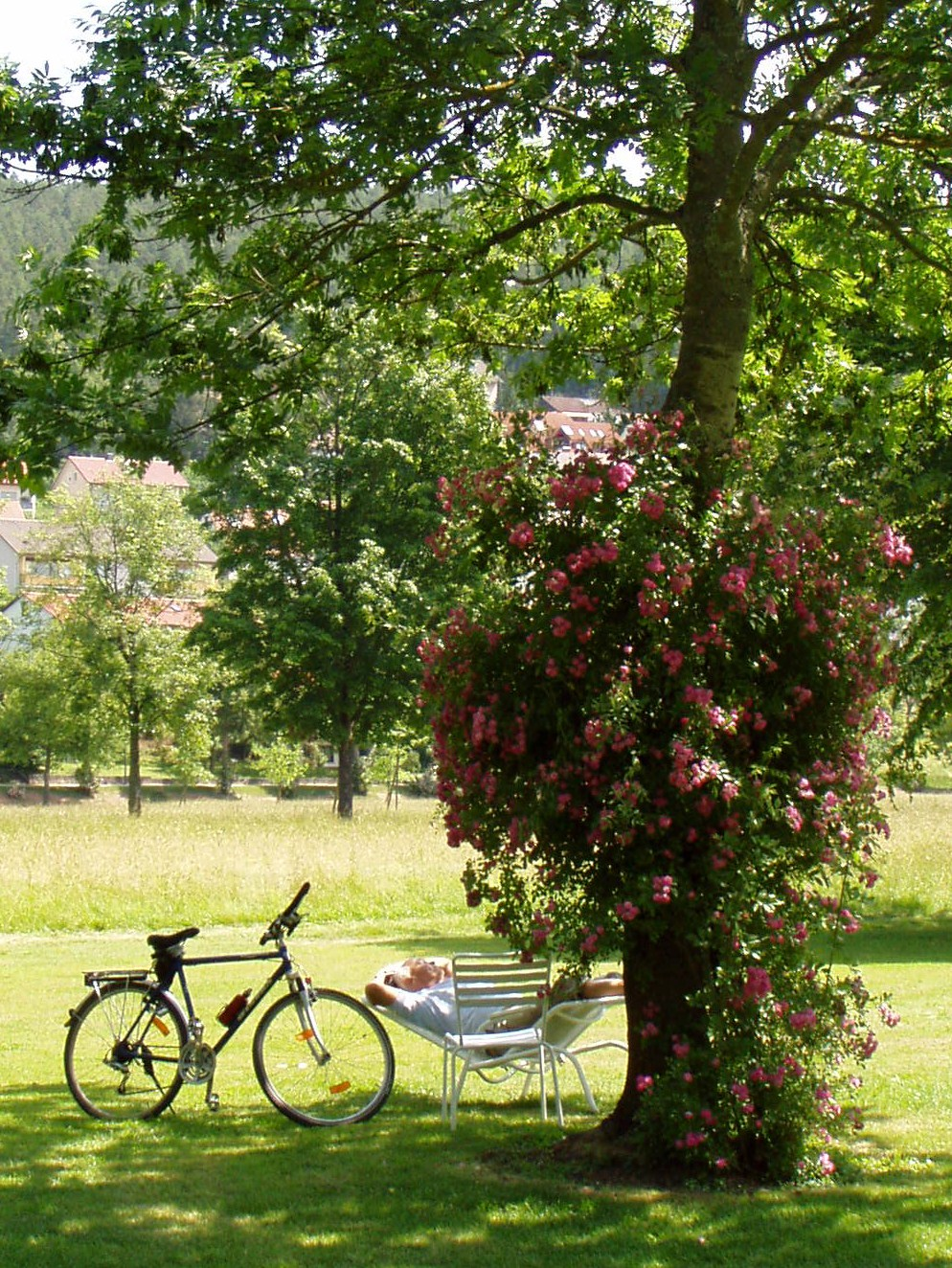 Radwandern (Kurpark in Bad Bocklet, Bayern)